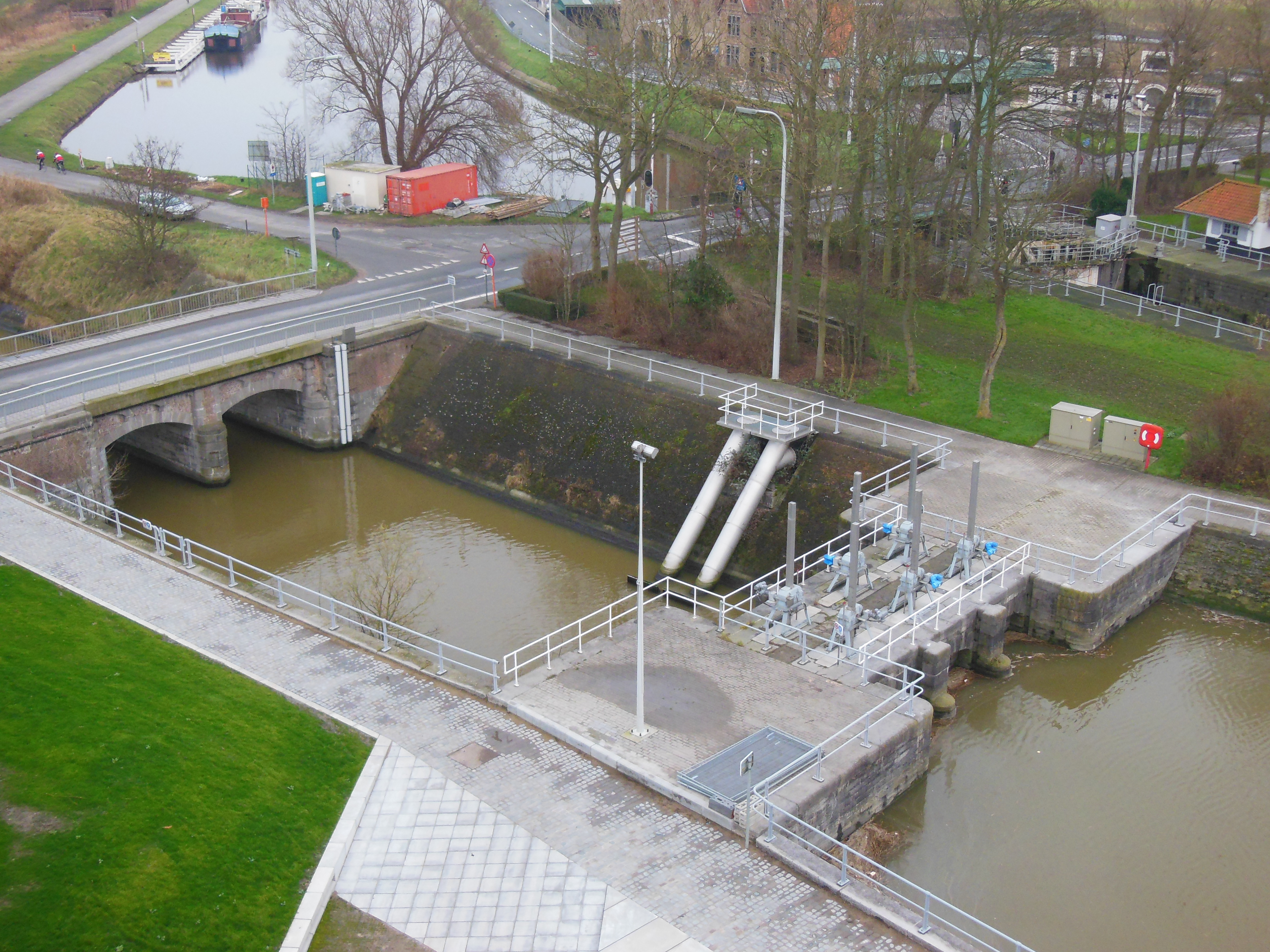 Panoramisch zicht op de overlaat van het Nieuwbedelf vanaf het Koning Albert I-monument